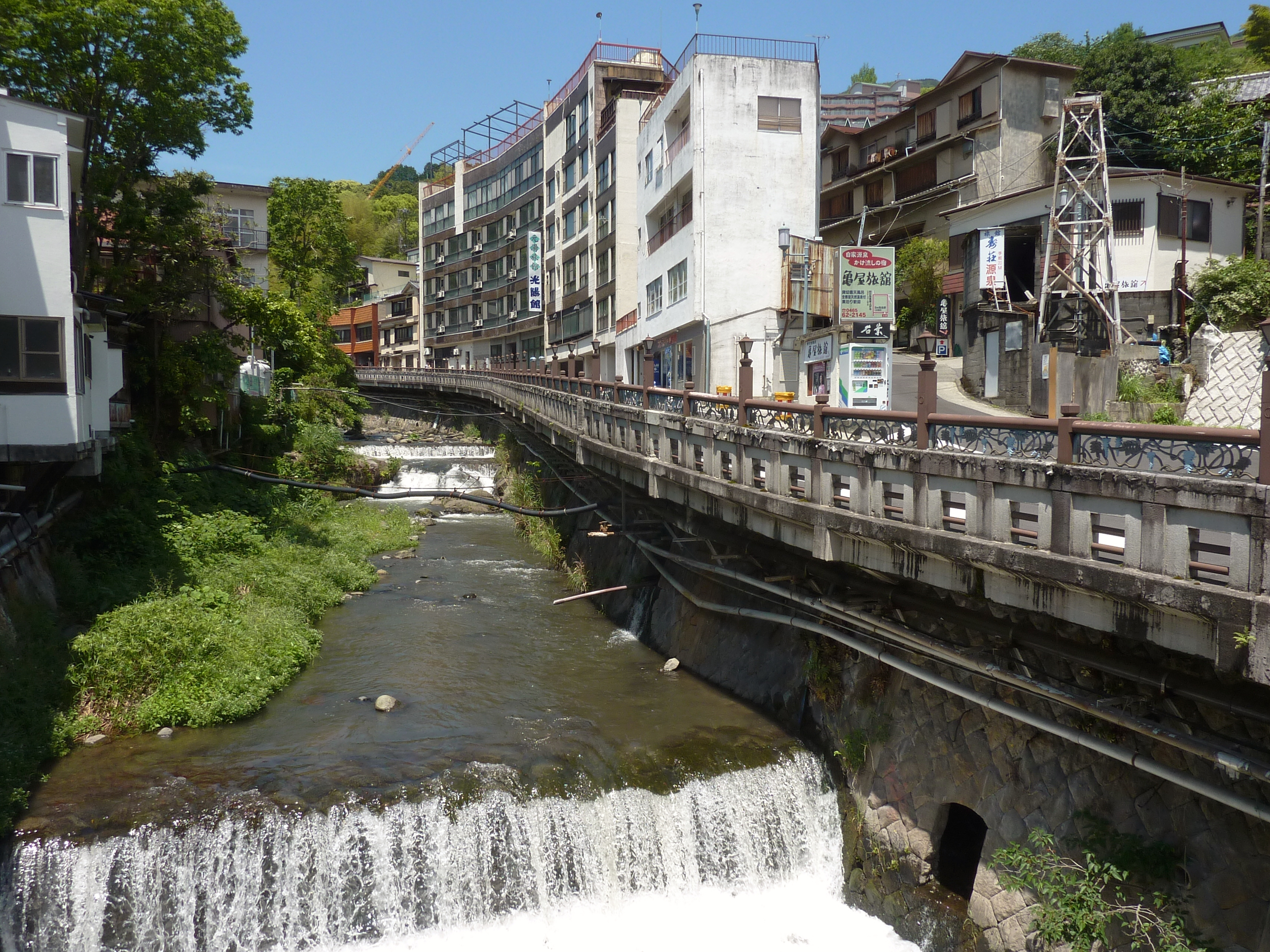 湯河原温泉（神奈川県湯河原町）